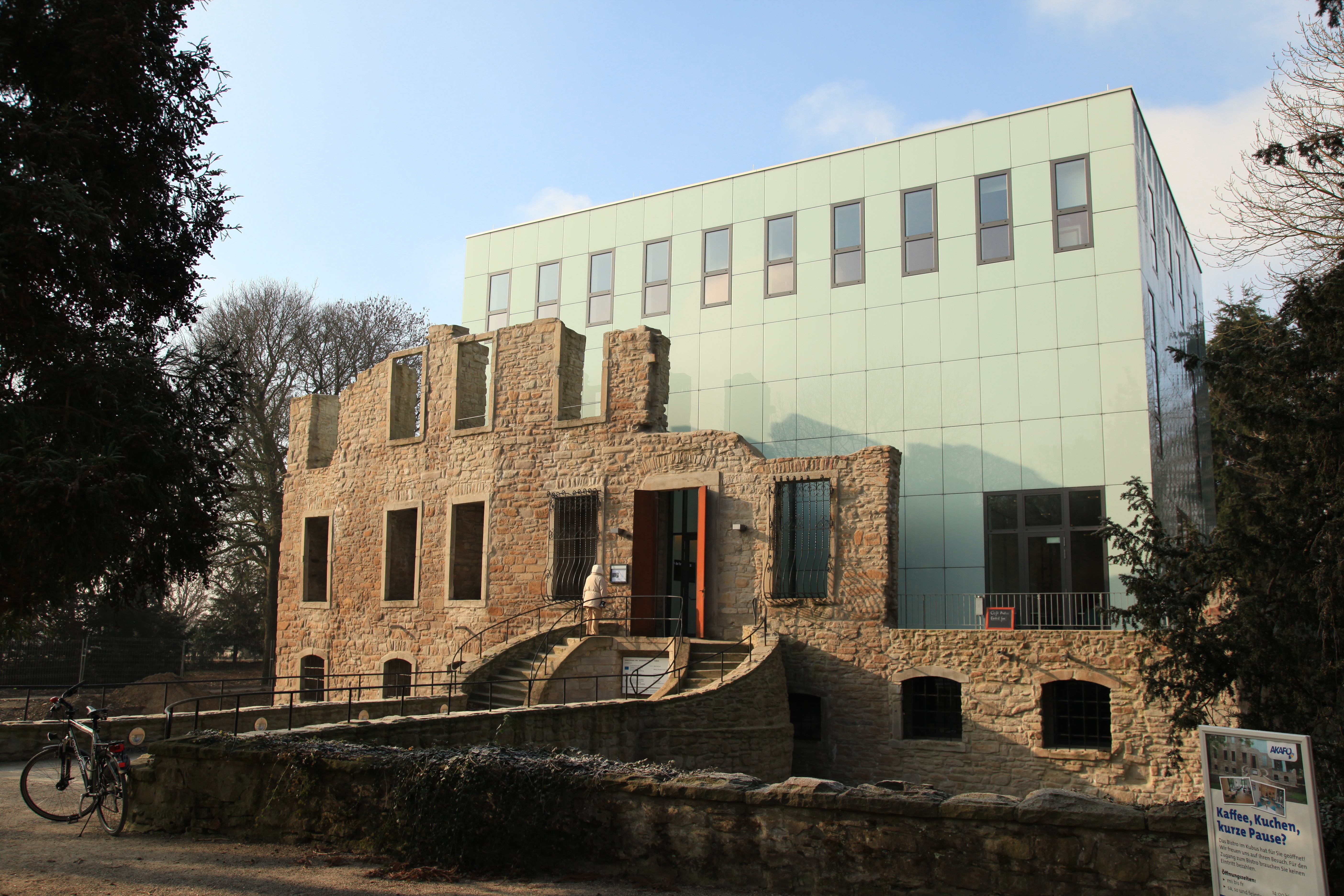 Haus Weitmar im Schlosspark Weitmar in Bochum